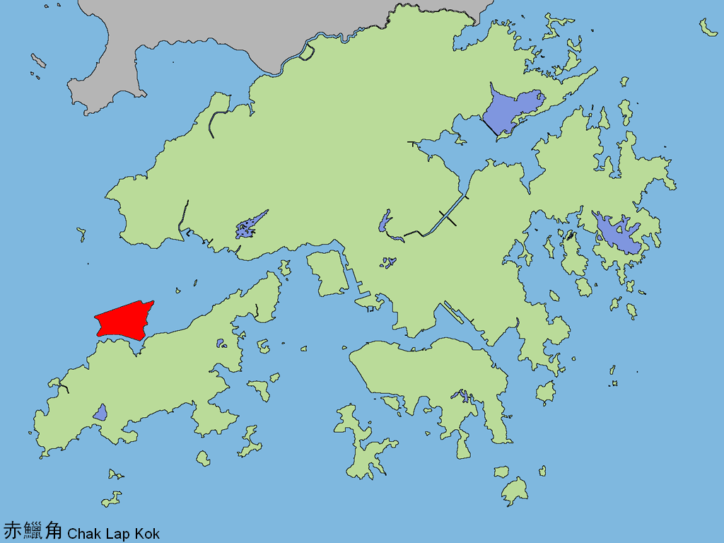 中文（香港）: 赤鱲角。